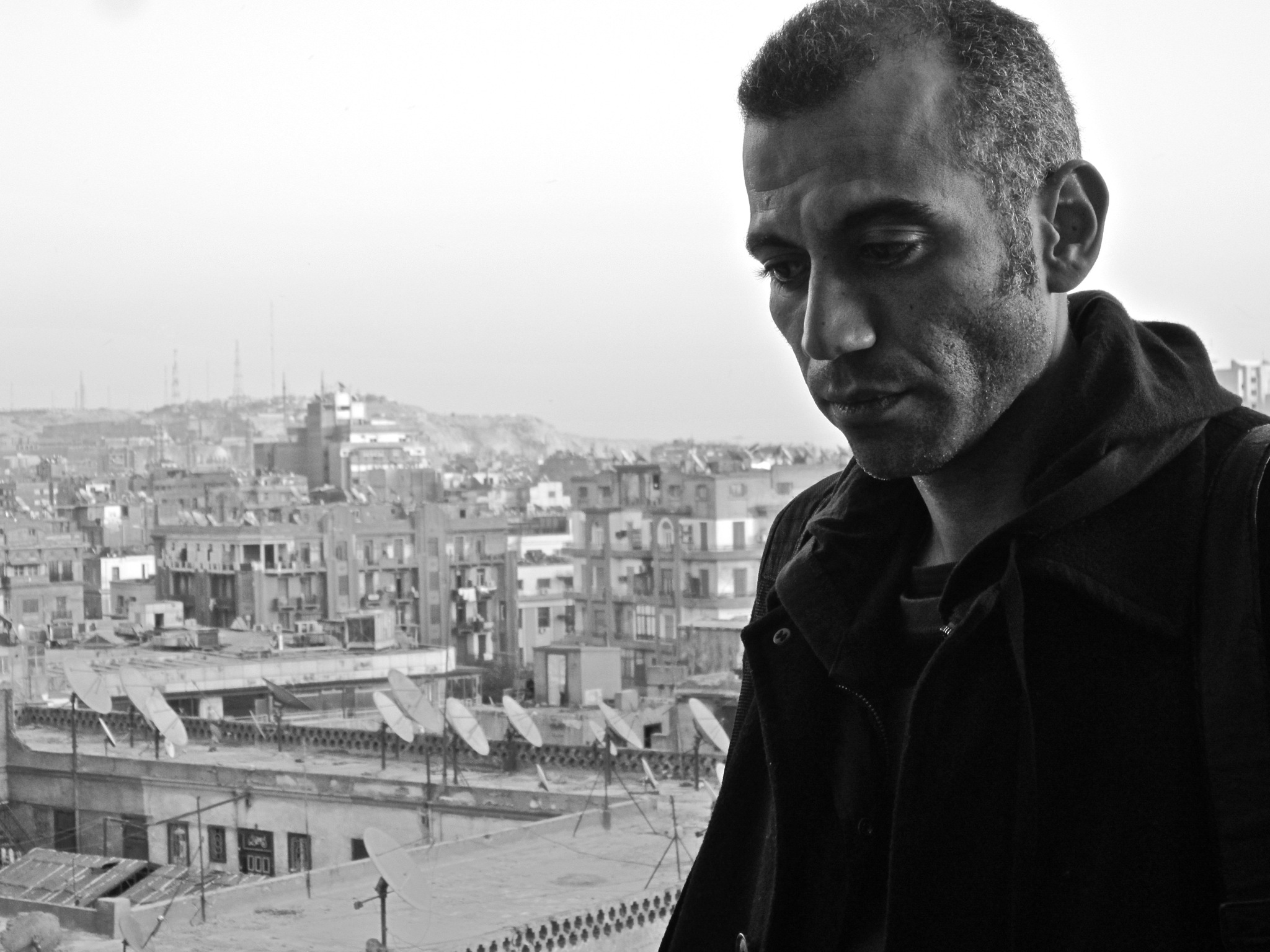 @3arabawy - Hossam